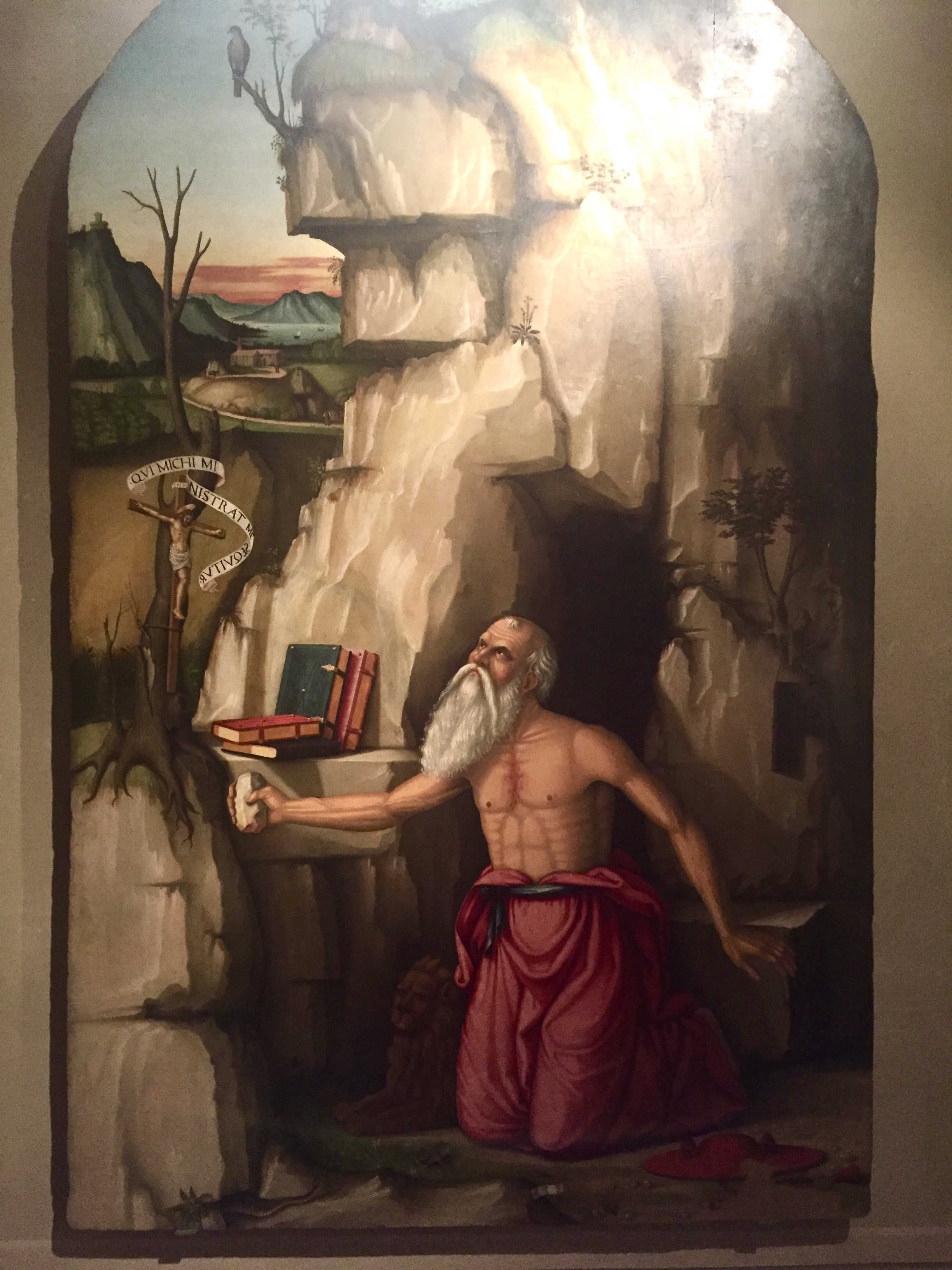 saint Jérôme de Pietro Paolo Agabiti, Jesi